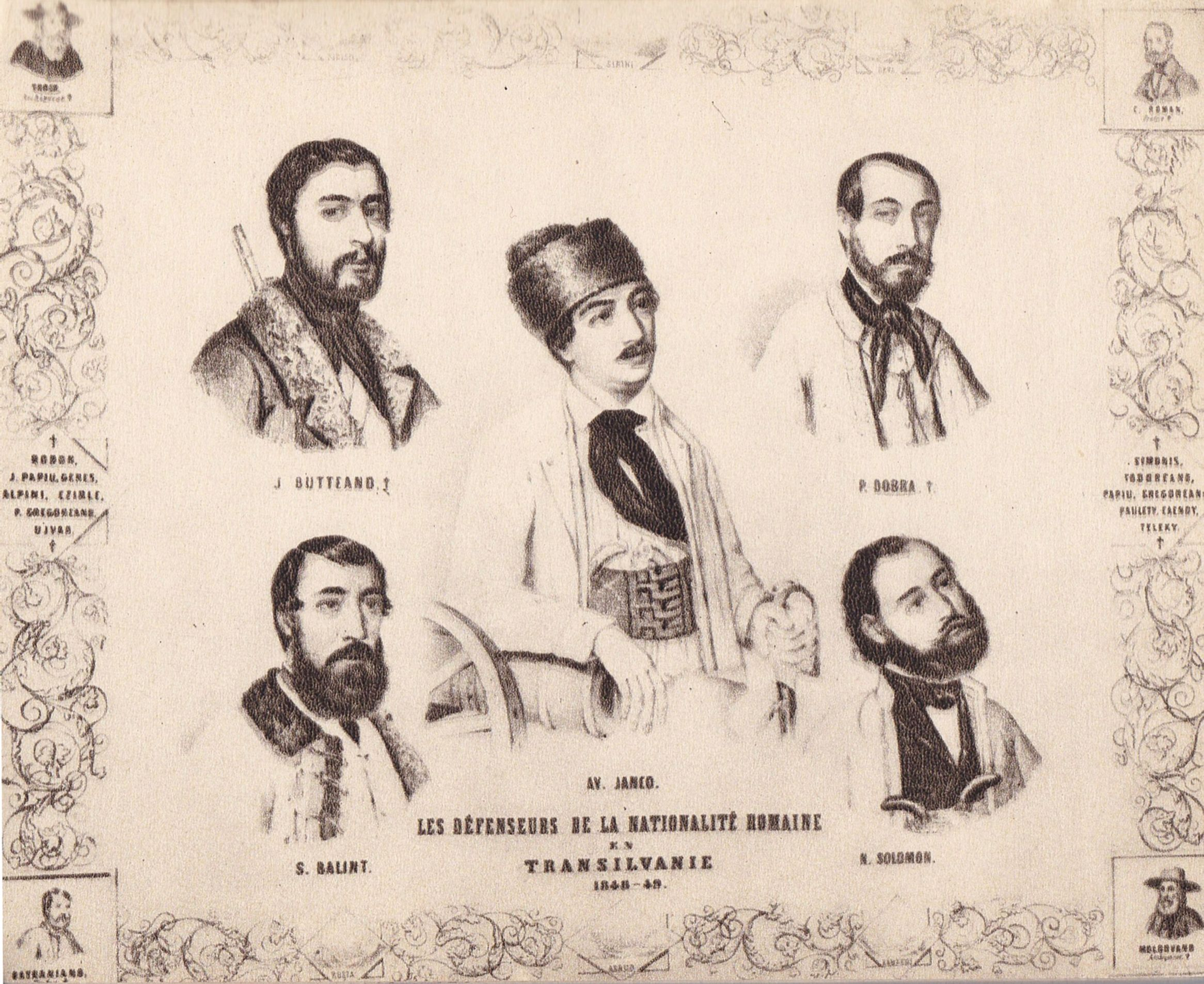 Aparatorii nationalitatii romane in Transilvania